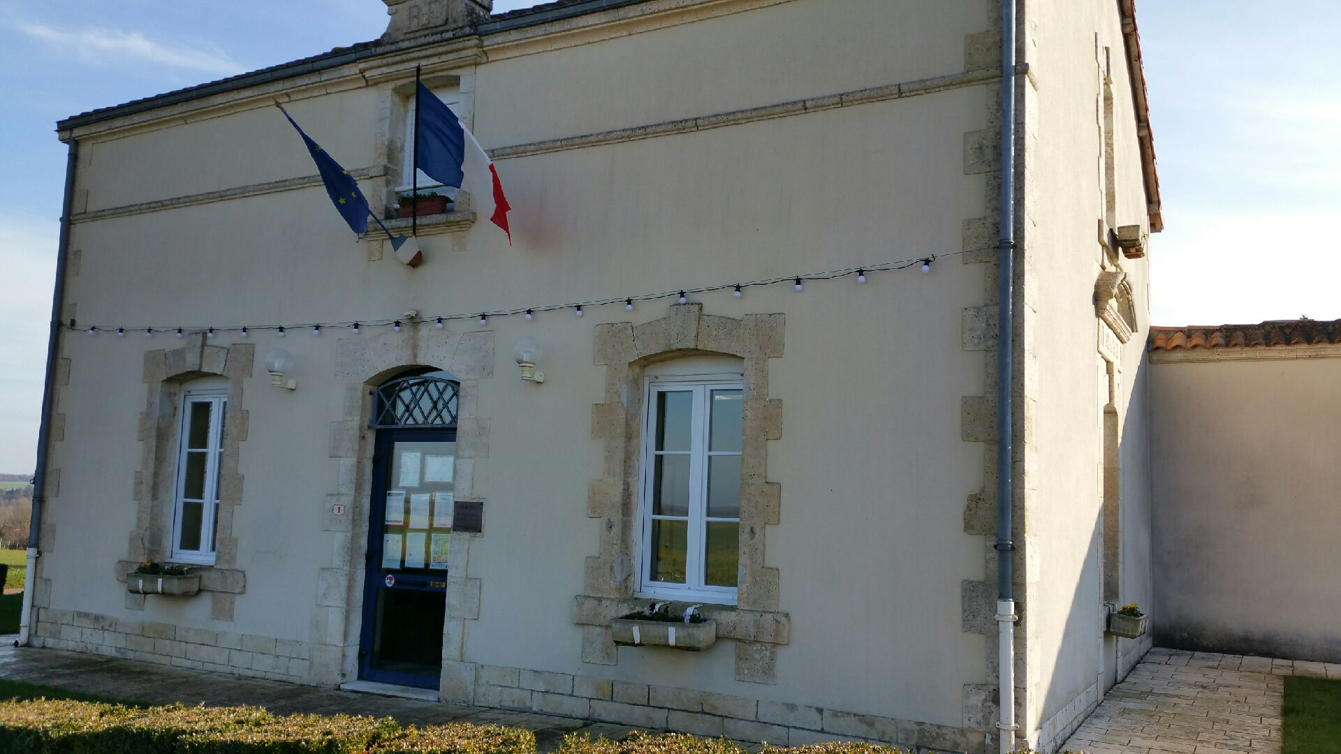 Marie de Chenon